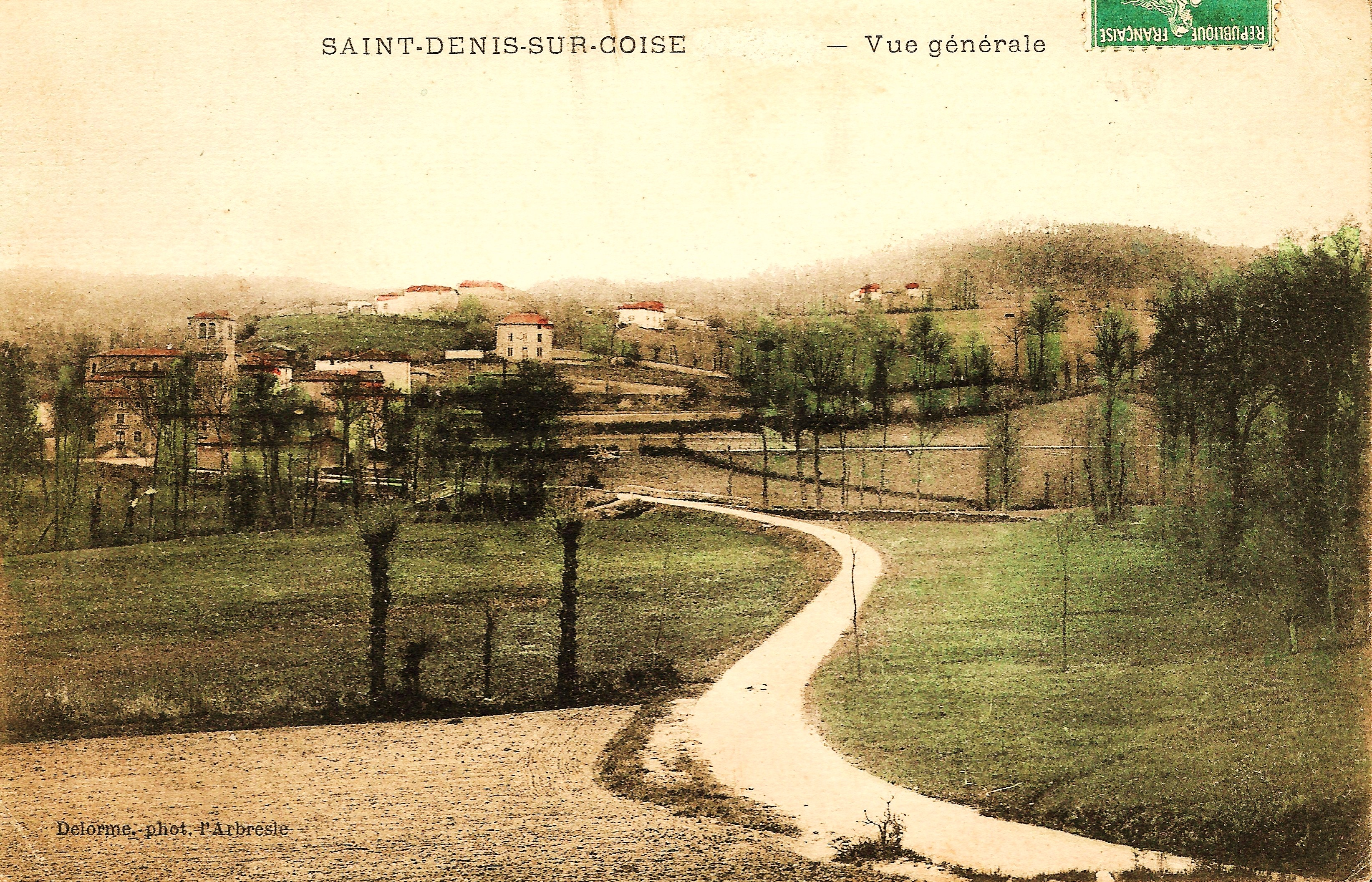 Saint-Denis-sur-Coise (loire). - Vue générale